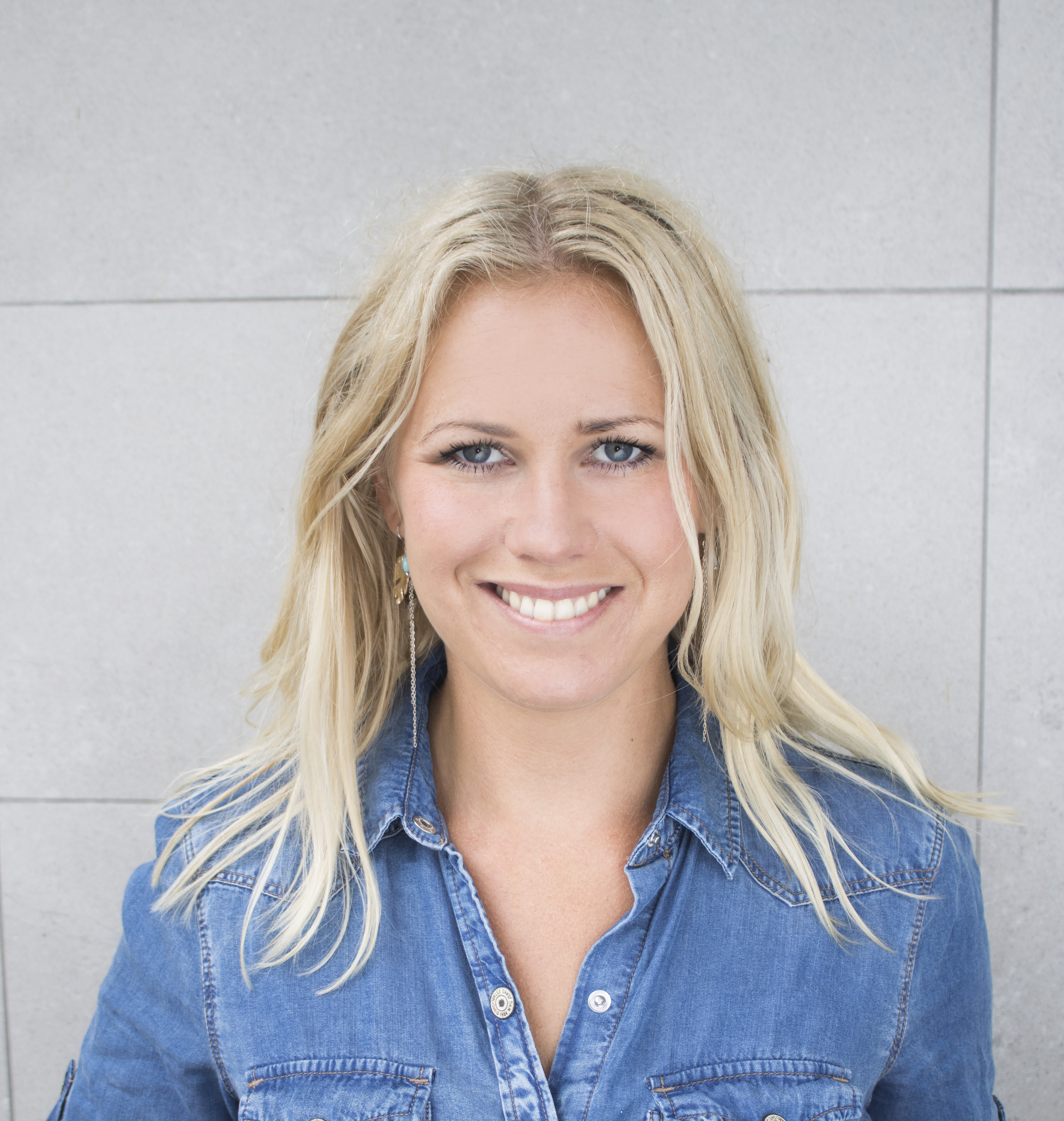 Hannah Svensson, 2016.